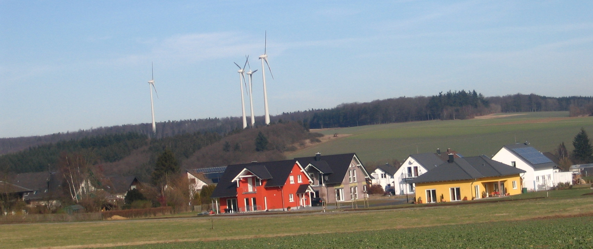 Keidelheim von Richtung Südwesten